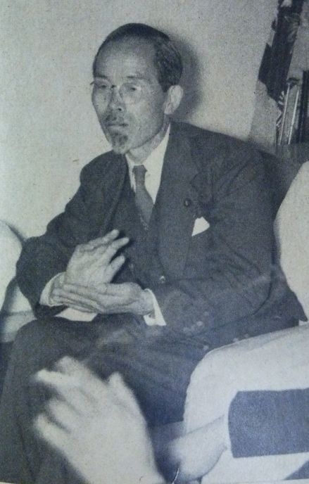 前田栄之助（第27回衆議院議員総選挙の繰上げ当選日）